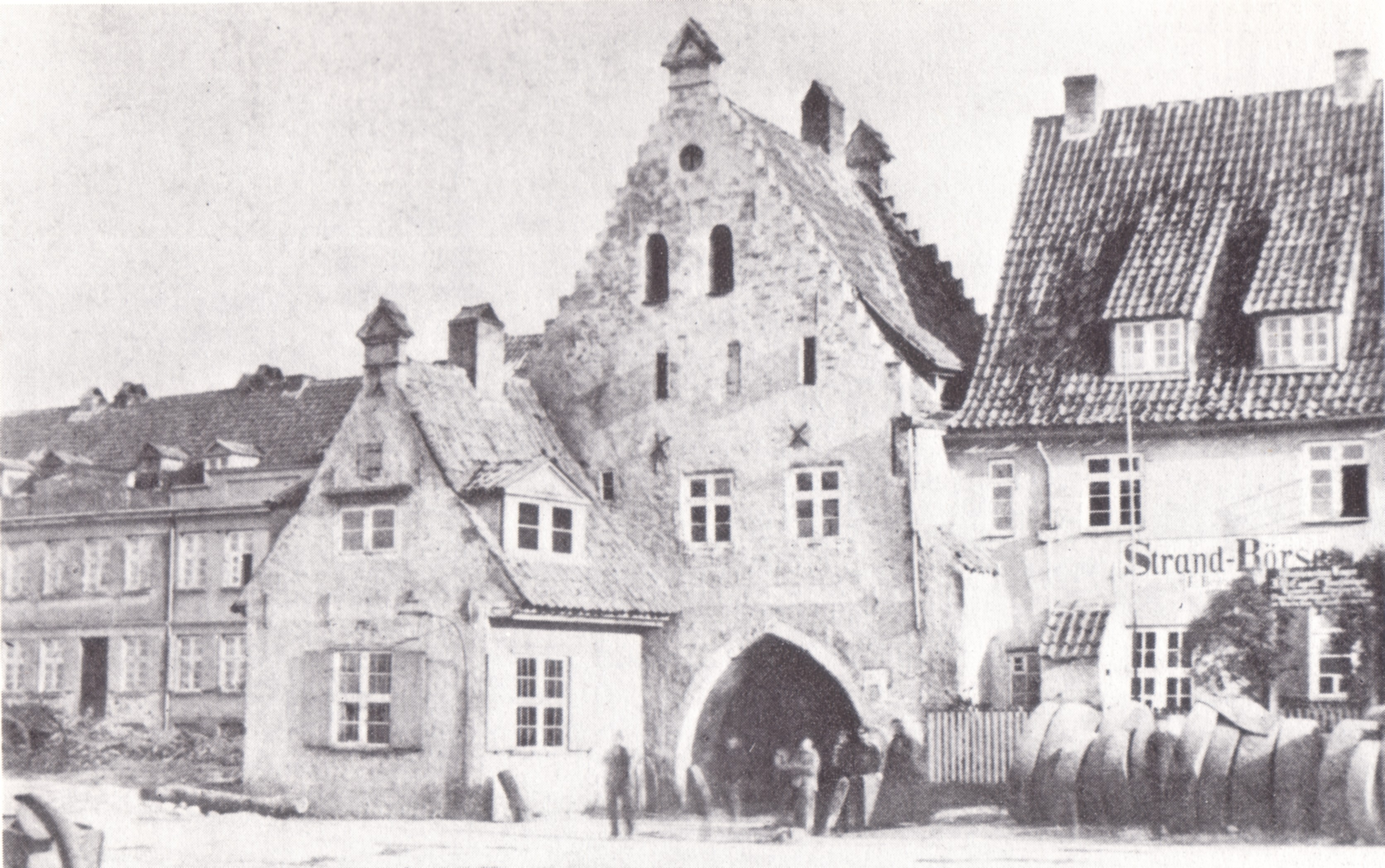 Burgwalltor Rostock, Strandseite, mit vorgebautem Zollhäuschen